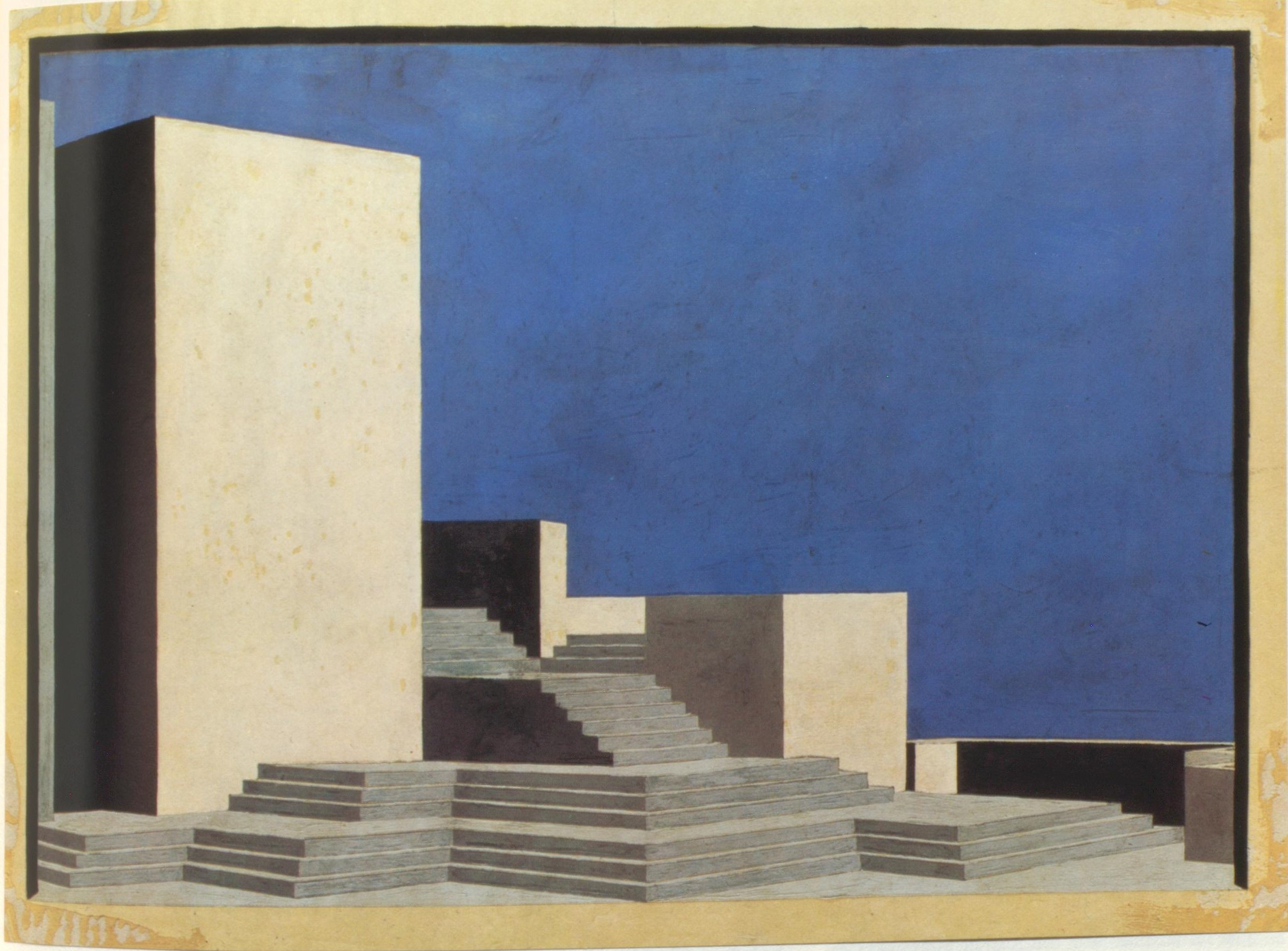 Ewald Dülberg Bühnenbildentwurf zu Fidelio 4. Bild Krolloper 1927